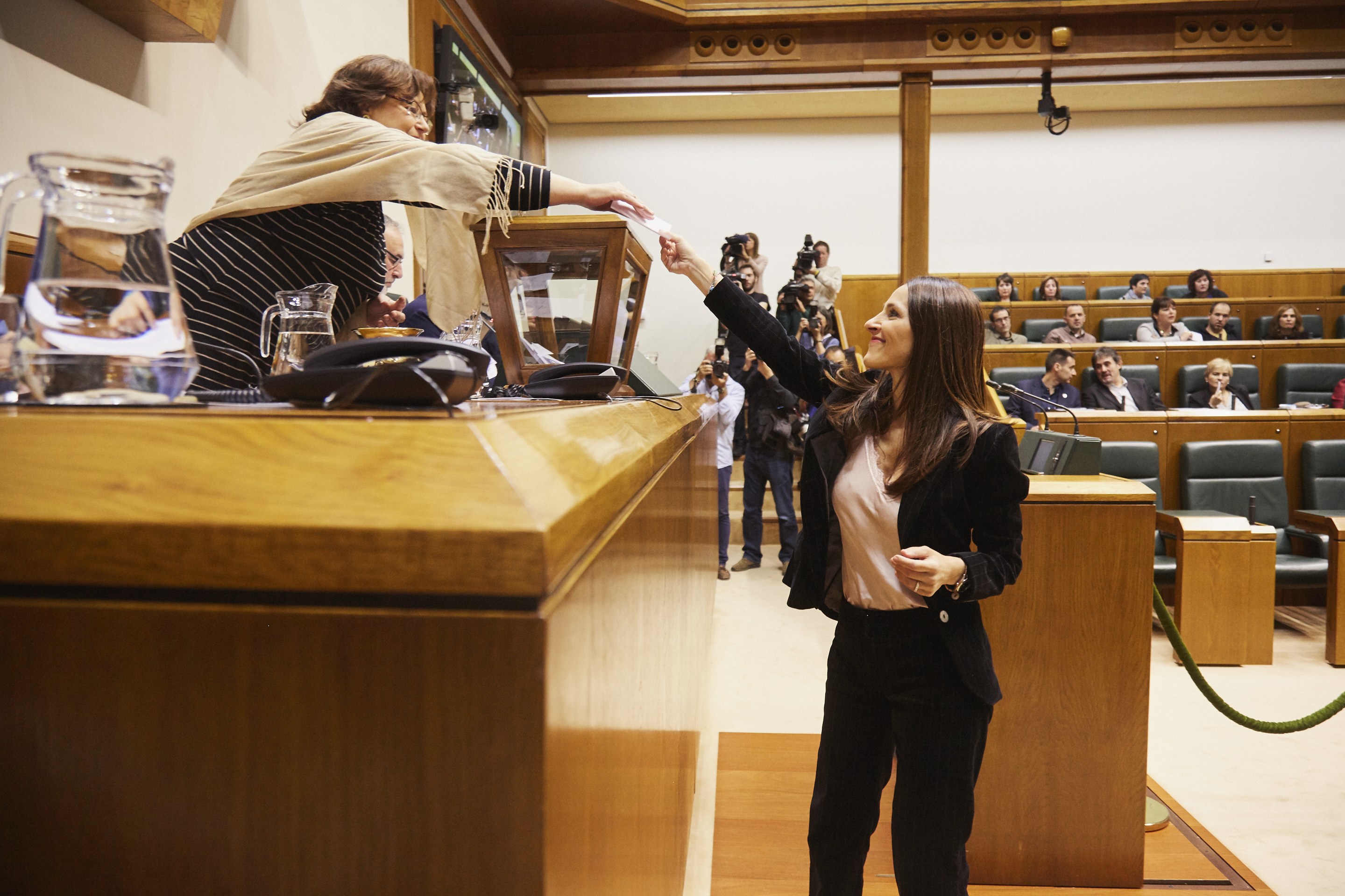 Bakartxo Tejeria bere bigarren hautaketarako botoa ematen